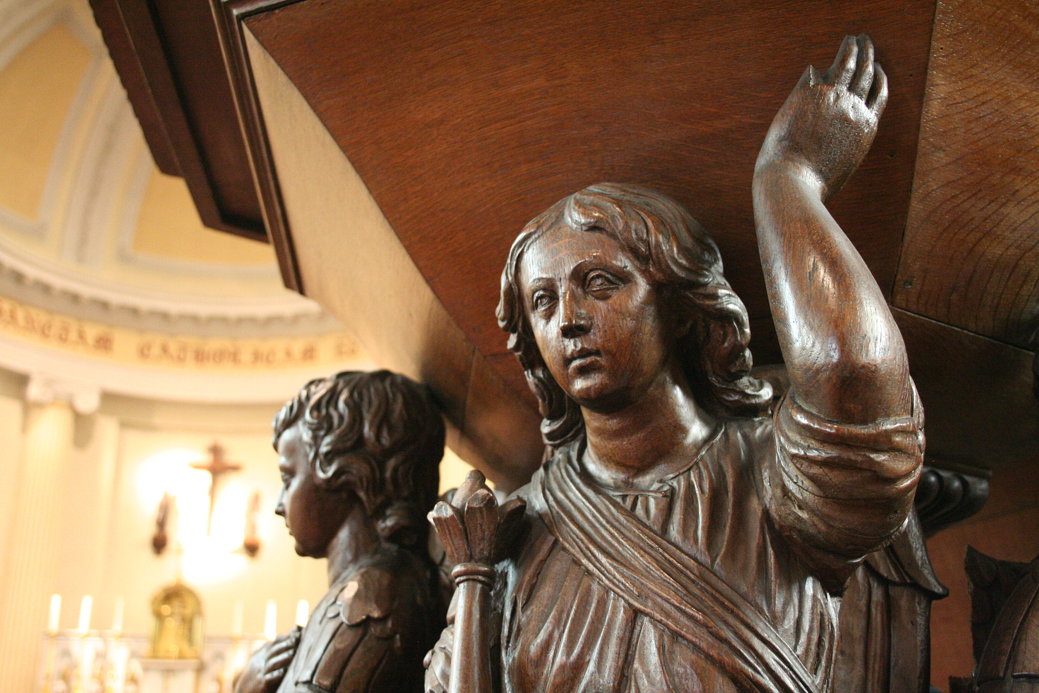 Wolfsdonk - Sint-Antonius Abt Kerk - Barokke preekstoel met één van de aartsengelen die de kuip schragen